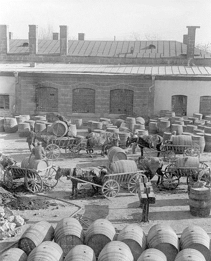 Wine and Brandy factory Երևանի գինու և կոնյակի գործարան